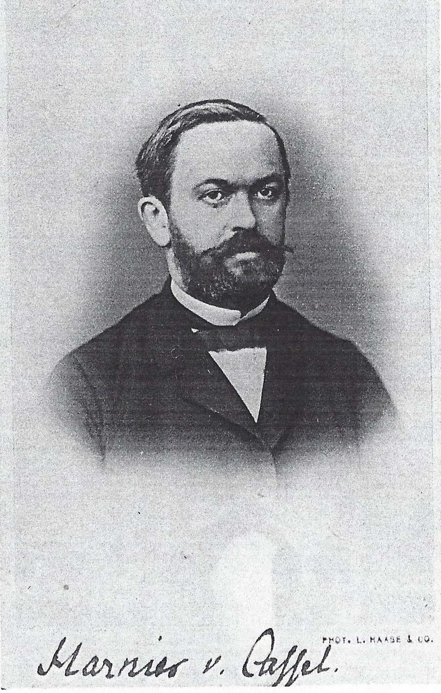 Signierte Porträtfotografie von Richard Harnier (1820-1885)